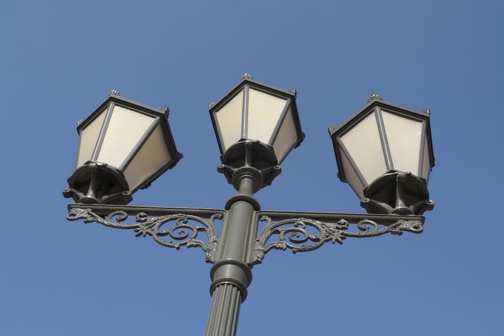 Jedna z kunsztownych lamp na rynku łódzkiej Manufaktury